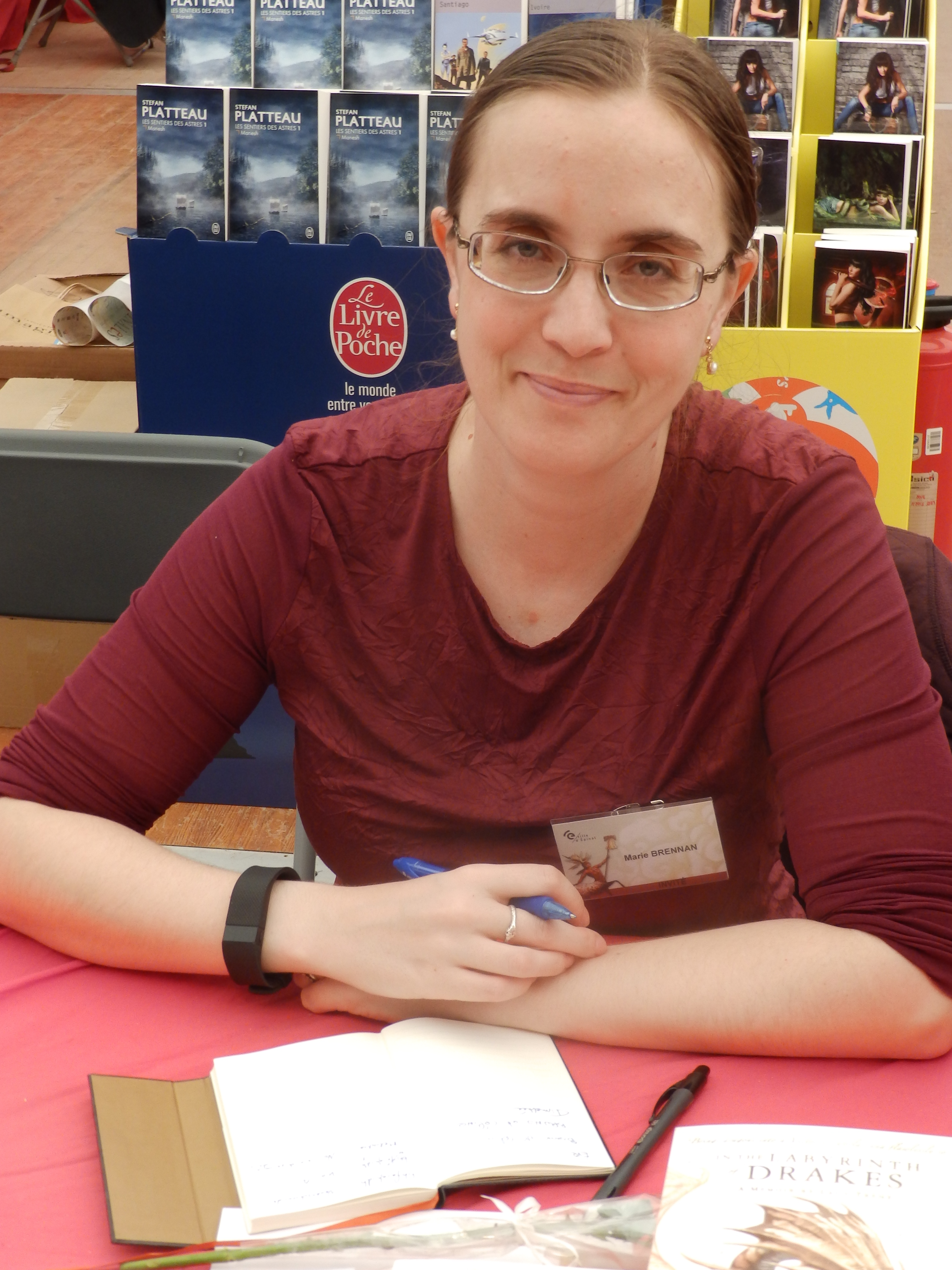 L'écrivaine de fantasy américaine Marie Brennan en dédicace lors de la 15ème édition du festival des mondes imaginaires Les Imaginales, à Épinal (département des Vosges, en France) en mai 2016.